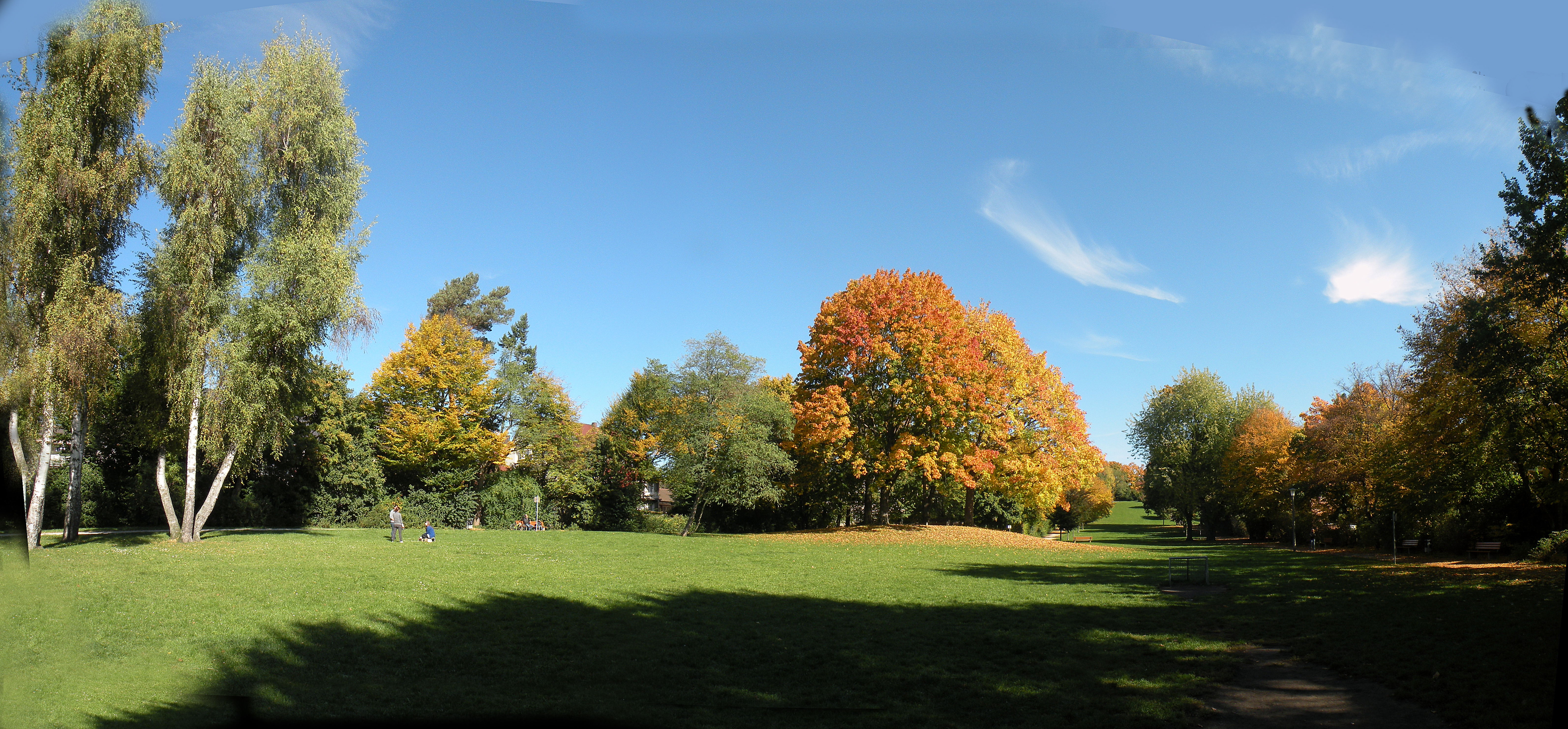 Rechenberg (Nürnberg)